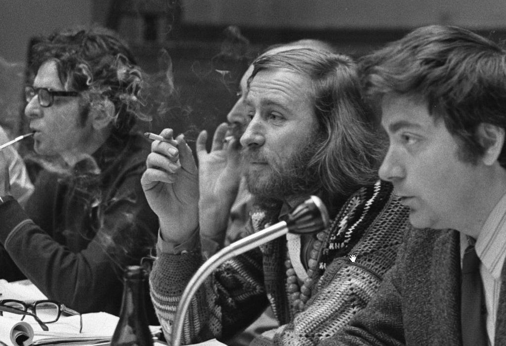 Joost Evers - Anefo: Ernst Vijlbrief (midden) en Bob Bonies (rechts) BBK-vergadering in Frascati, Amsterdam 1969 (crop)